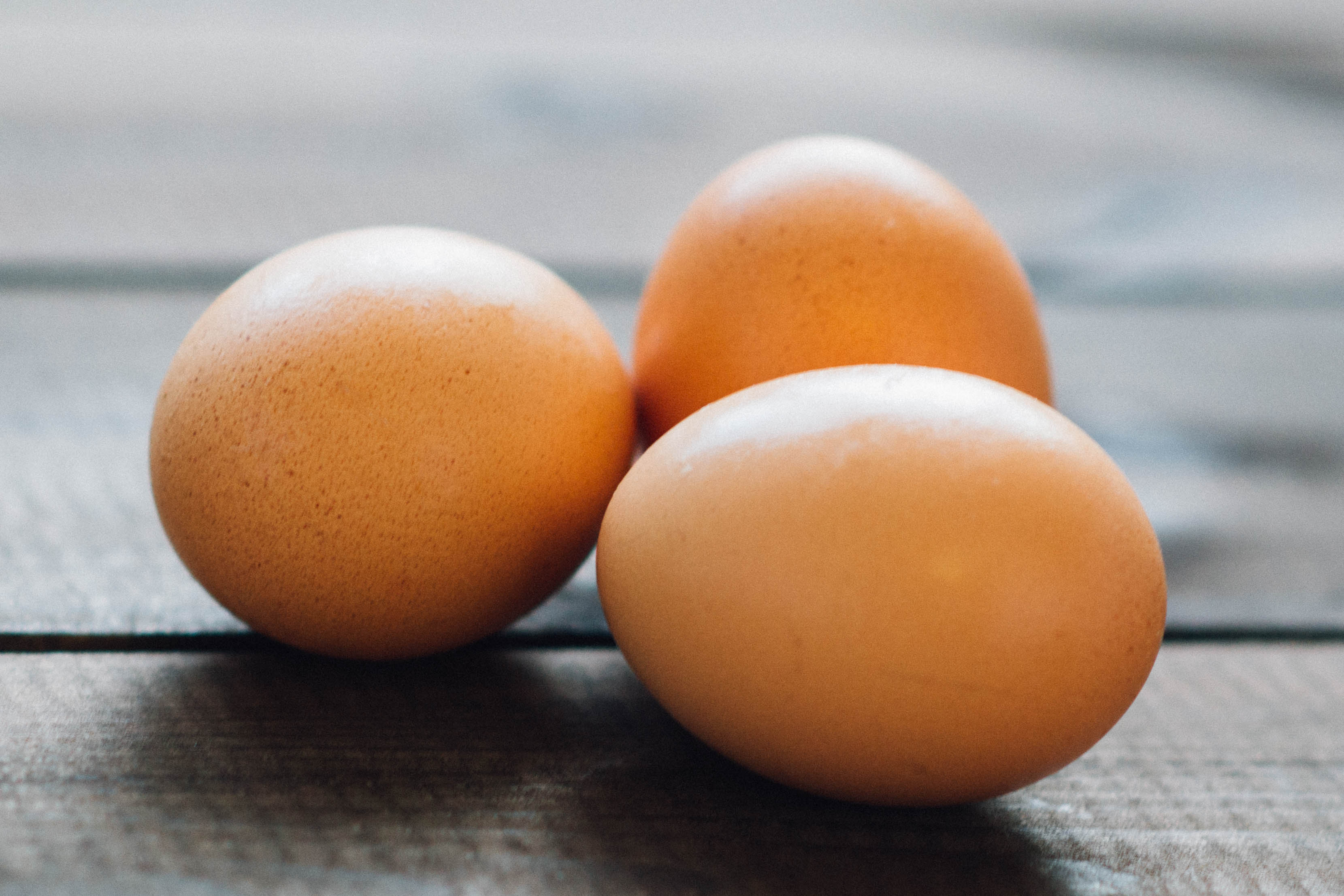 Chicken eggs